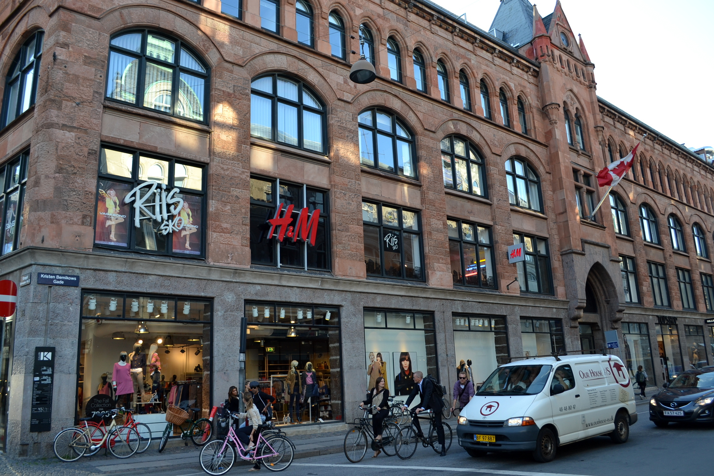 Galleri K seen from Kristen Bernikows Gade in Copenhagen, Denmark